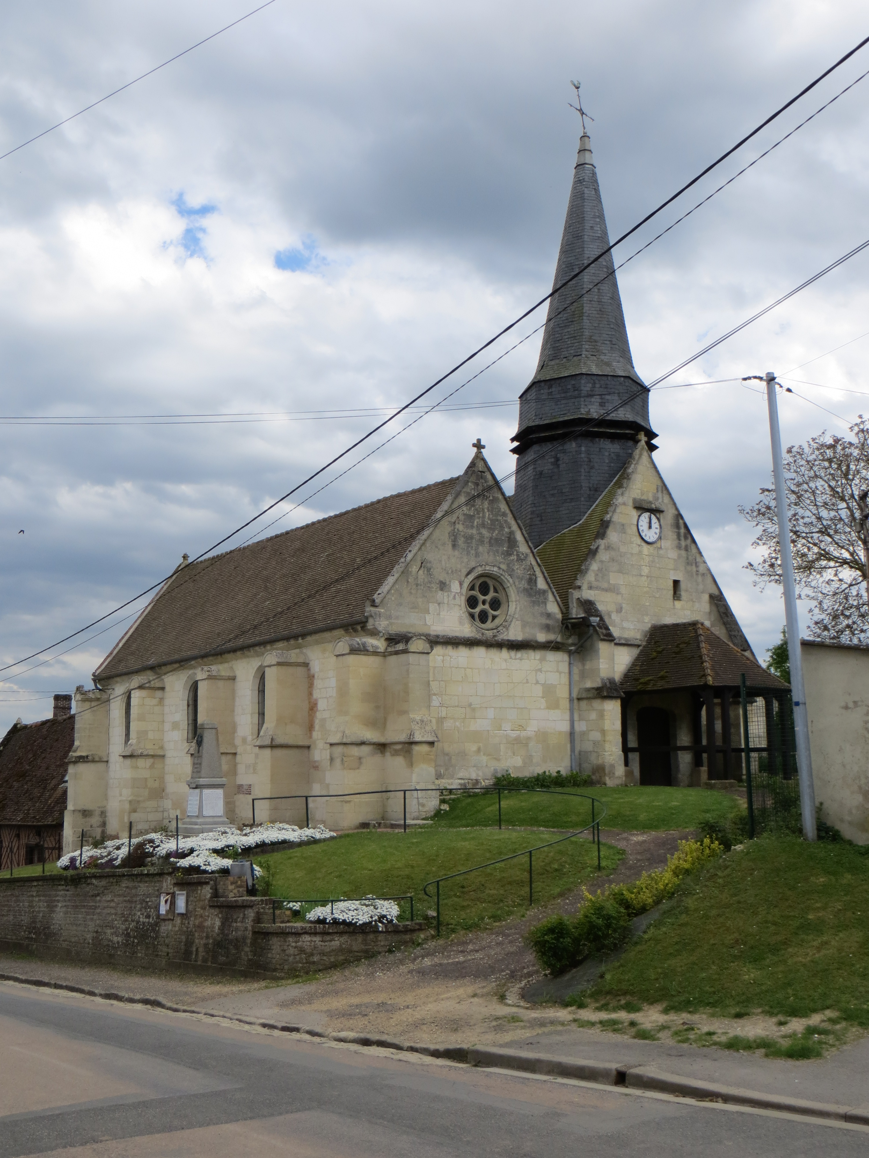 Vue générale de l'église